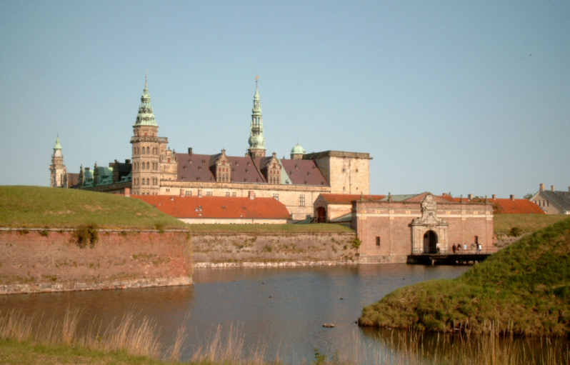 Kronborg Slot - eget billede, taget fra vestlige forterræn nord for ravelinen. I forgrunden ydre voldgrav og Kronværksporten.